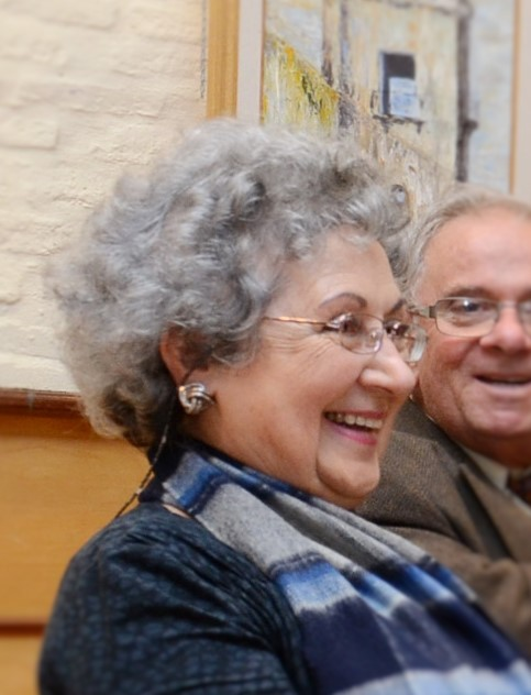 Martina Iñíguez y Juan Antonio Varese en un acto académico realizado el 23 de junio de 2013 en Montevideo, Uruguay.